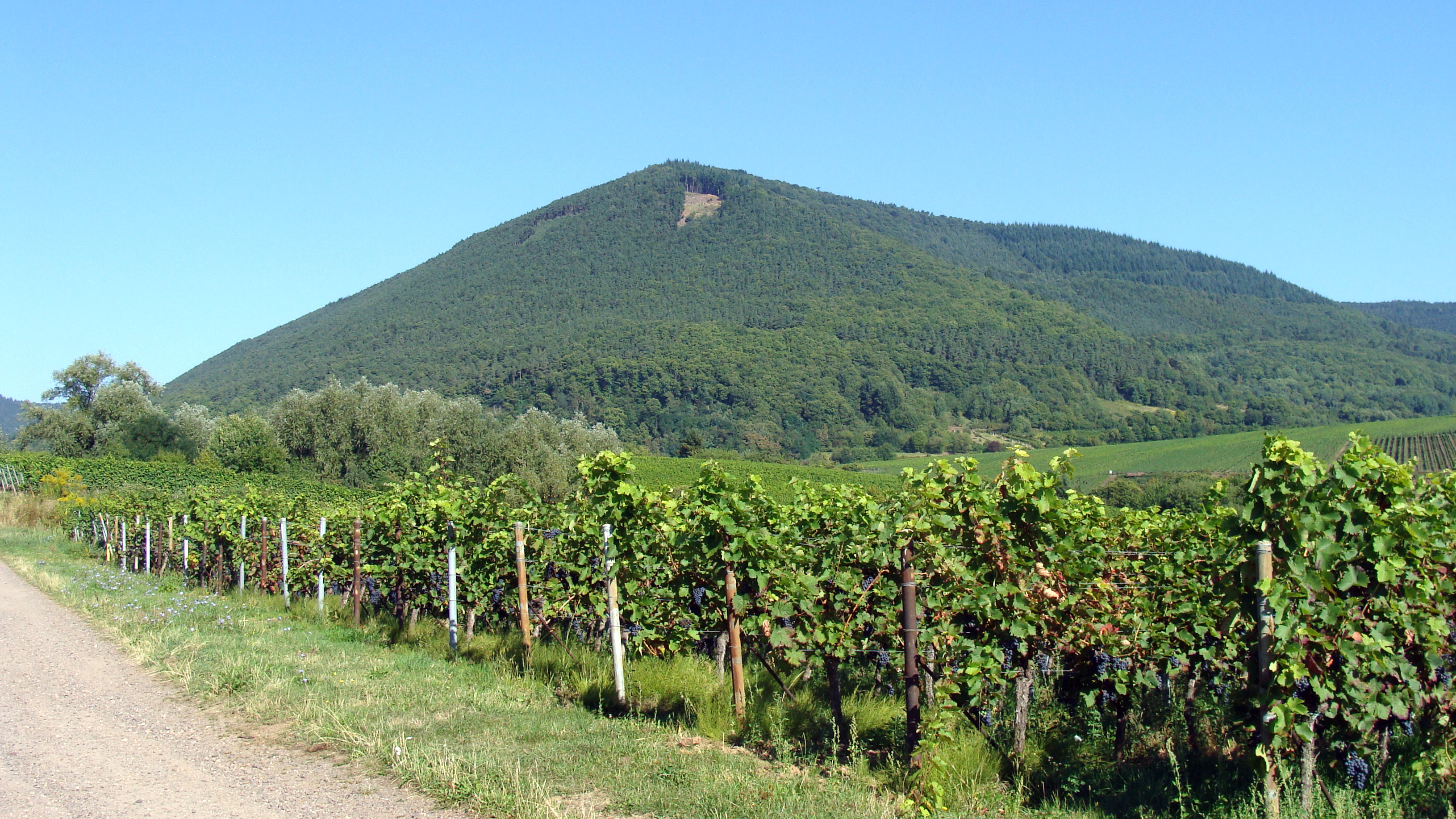 Blättersberg (Haardt/Pfälzerwald)